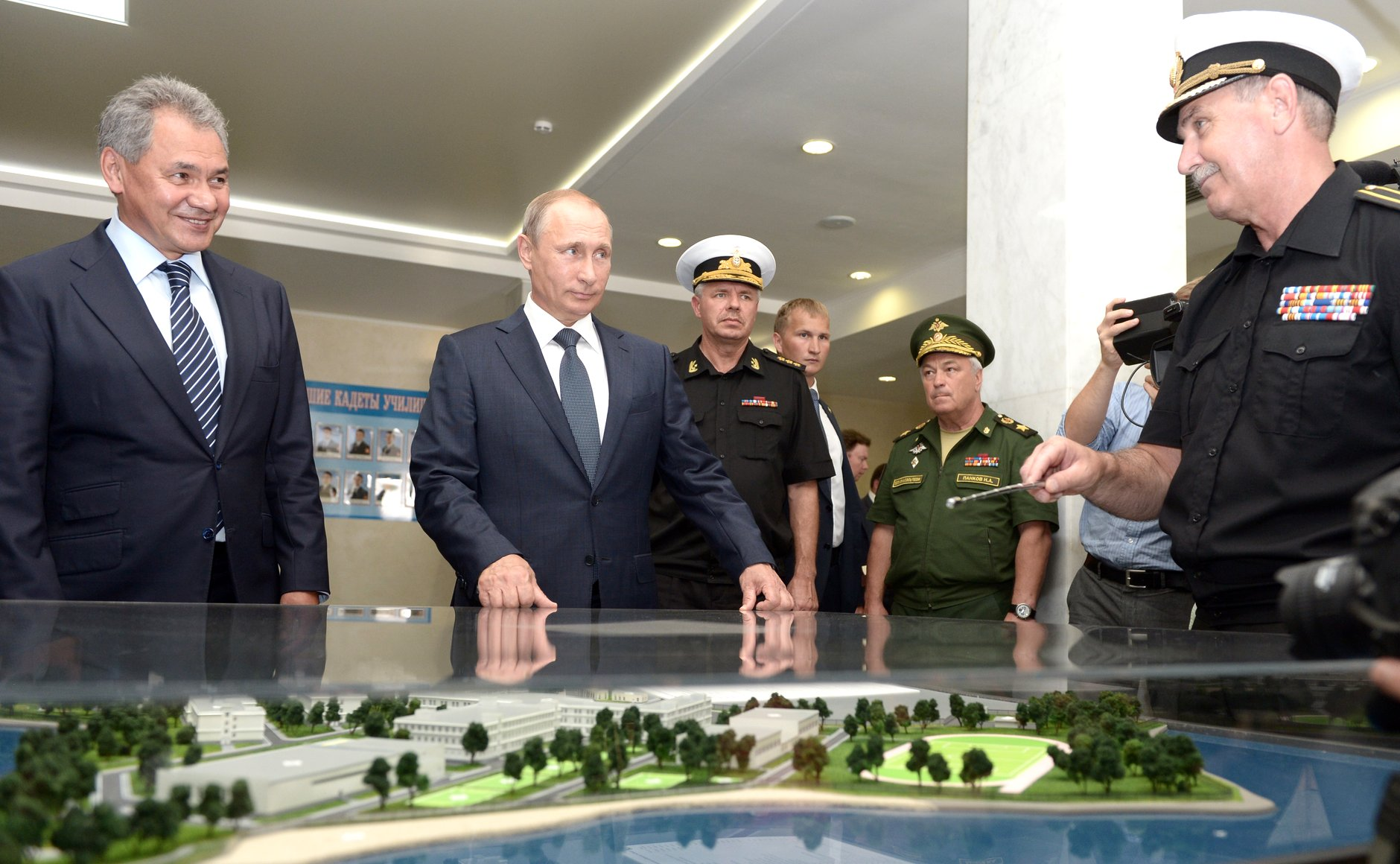 Владимир Путин и Сергей Шойгув Севастопольском президентском кадетском училище